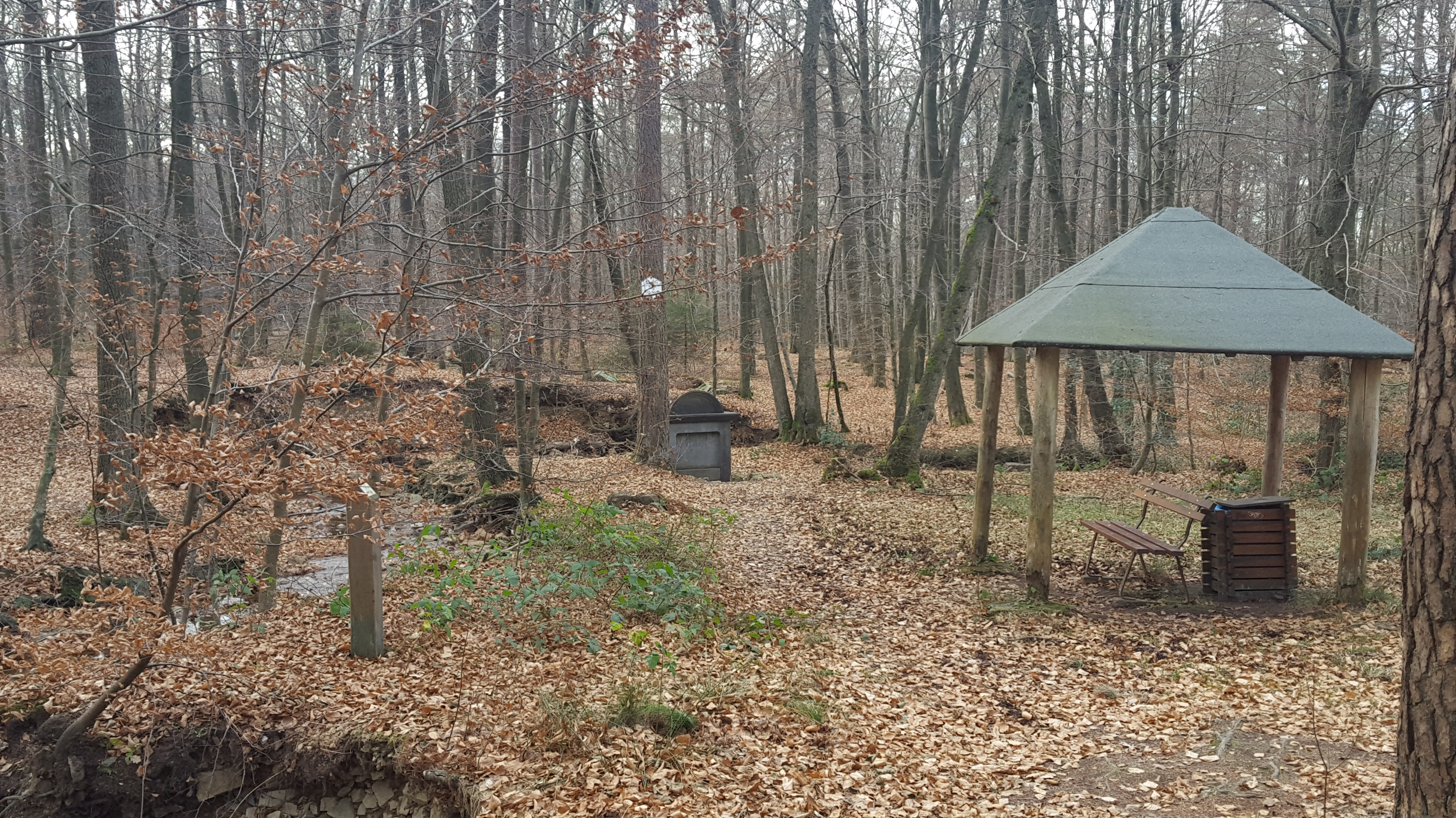 Pouhon Pia, Spa, Belgique